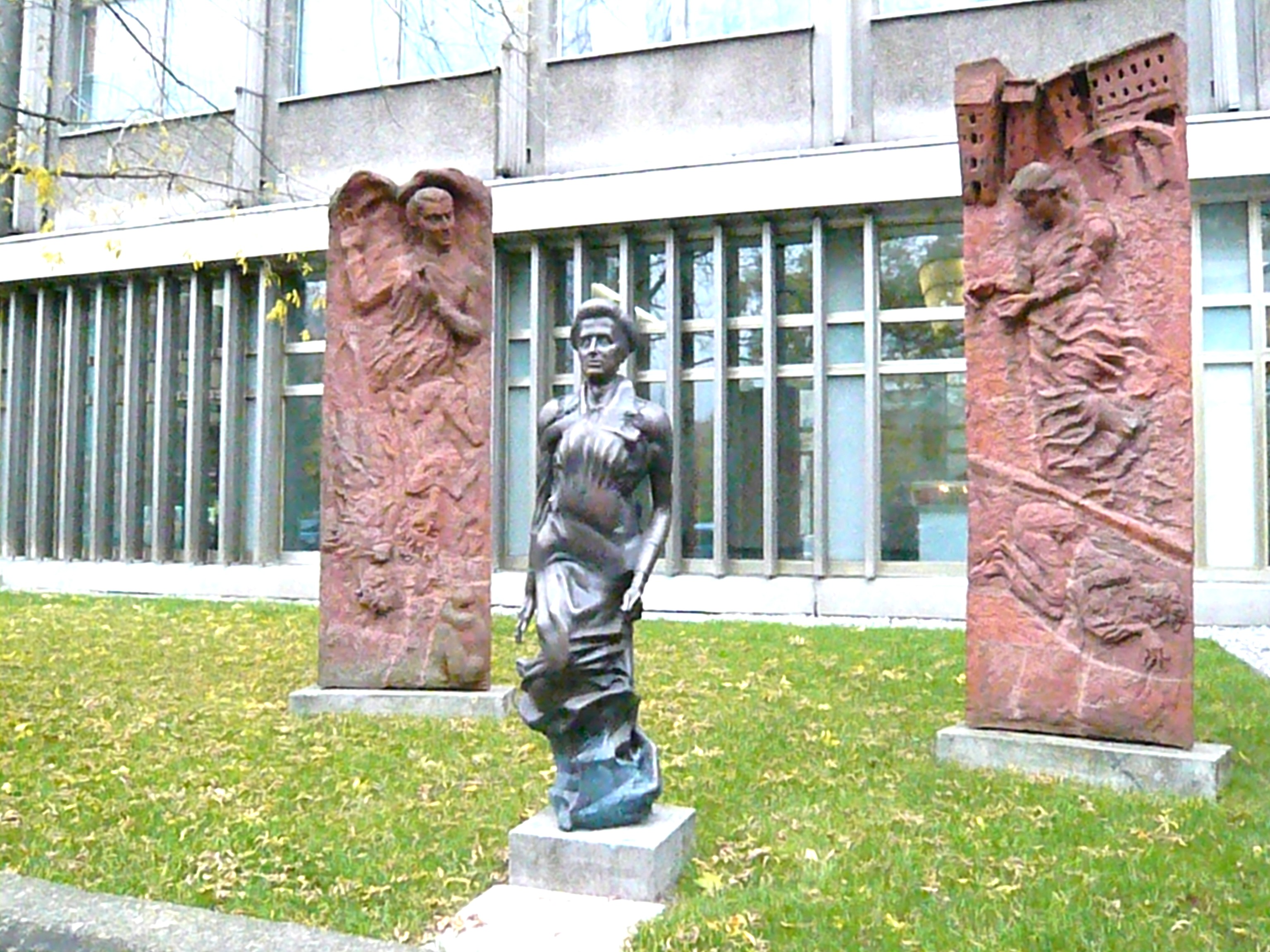 Straße im Ortsteil Berlin-Friedrichshain/ Franz-Mehring-Platz: Reliefs von I. Hunzinger für Karl Liebknecht und Mathilde Jacob, Statue Rosa Luxemburg